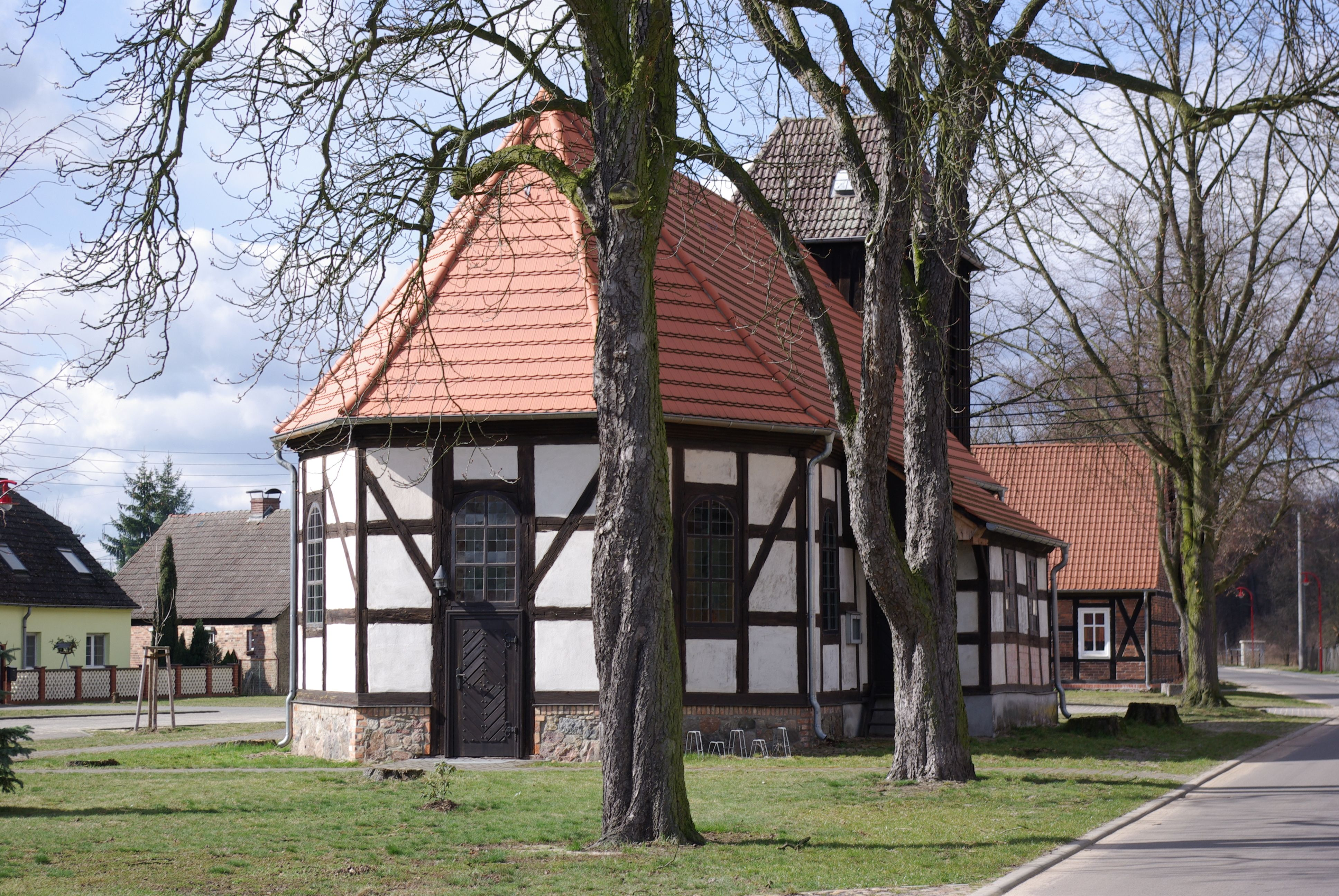 Rietzneuendorf-Staakow Ortsteil Rietzneuendorf in Brandenburg. Die Kirche aus Richtgung Osten. Die Kirche ist Denkmalgeschützt.